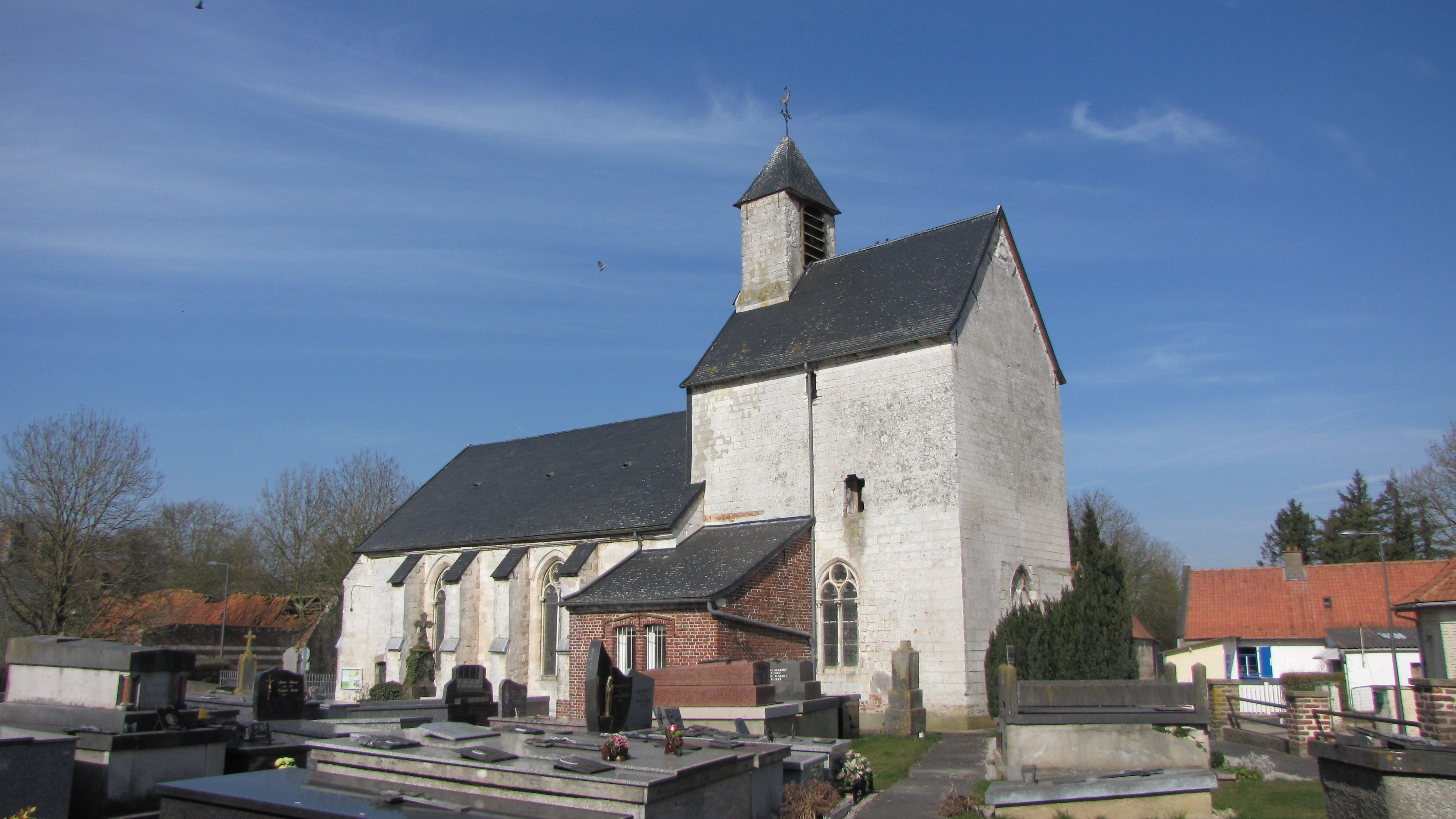 L'église de Leulinghem